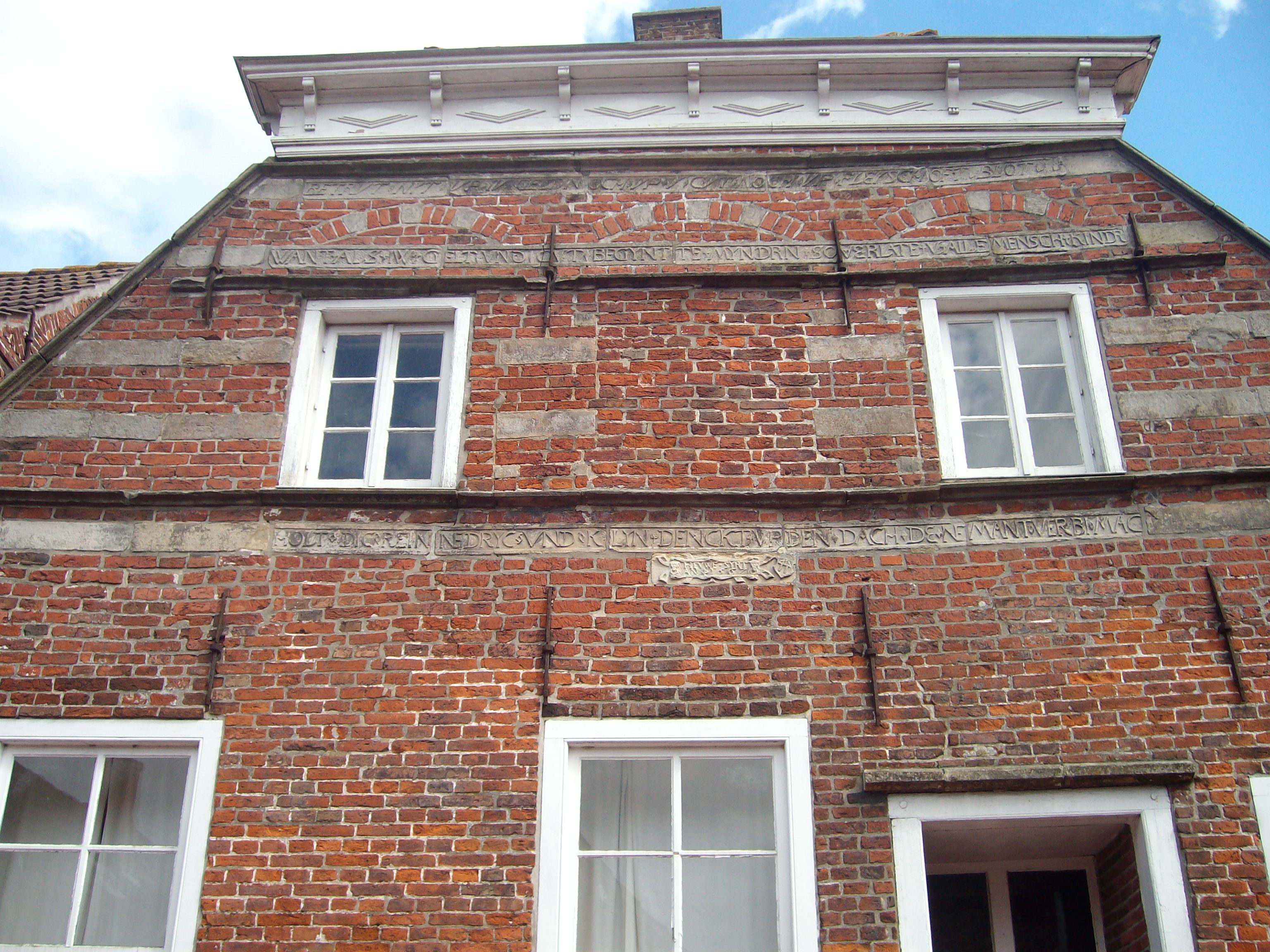 Giebel des Albahauses in Jemgum, Ostfriesland